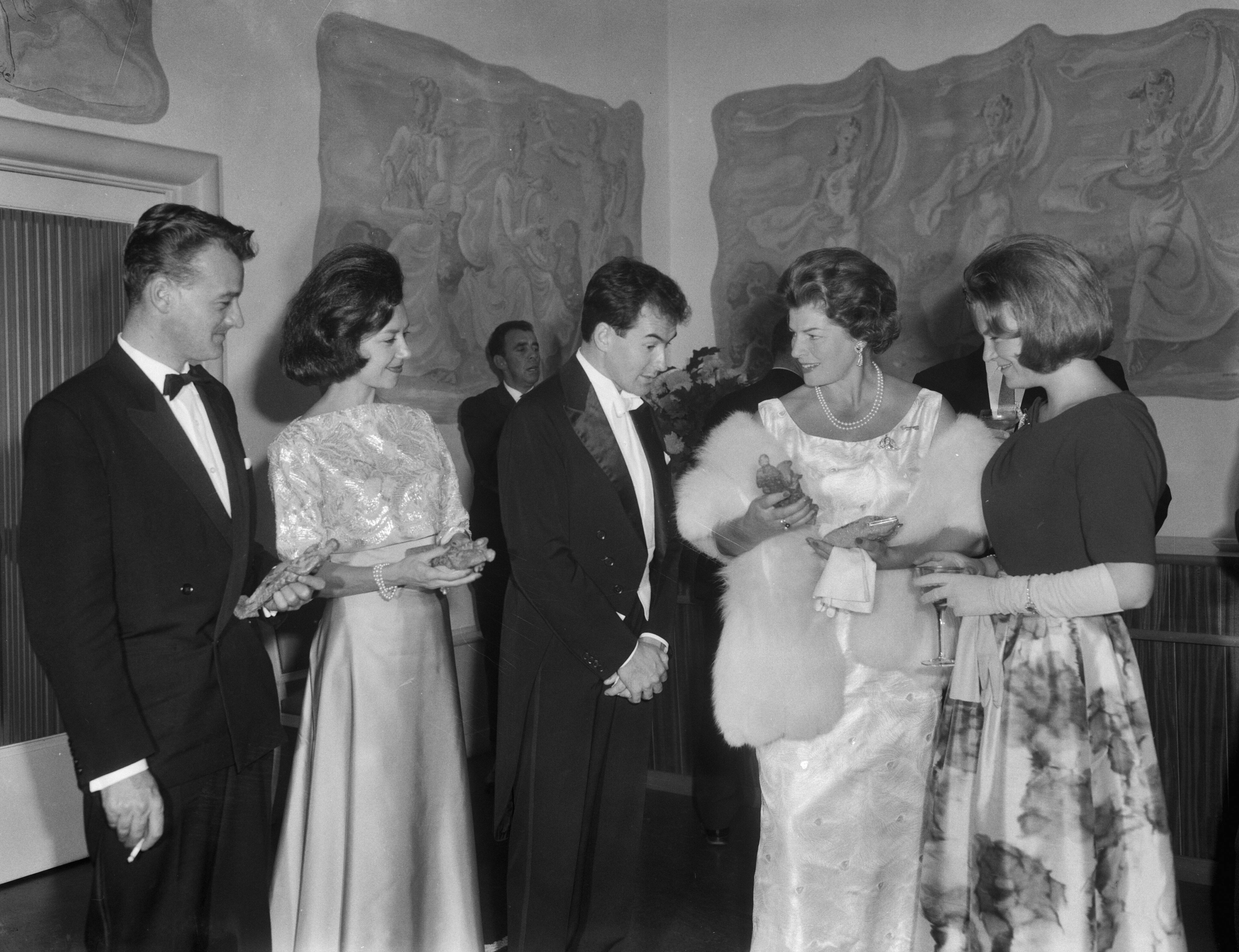 Collectie / Archief : Fotocollectie Anefo Reportage / Serie : [ onbekend ] Beschrijving : Grand Gala du Disque Classique .John Culshaw, Silvia Stahlman, Adam Harasiewicz, Gré Brouwenstijn, prinses Irene Datum : 4 oktober 1963 Persoonsnaam : Gre Brouwenstijn, Irene, prinses Fotograaf : Bilsen, Joop van / Anefo Auteursrechthebbende : Nationaal Archief Materiaalsoort : Negatief (zwart/wit) Nummer archiefinventaris : bekijk toegang 2.24.01.04 Bestanddeelnummer : 915-6009